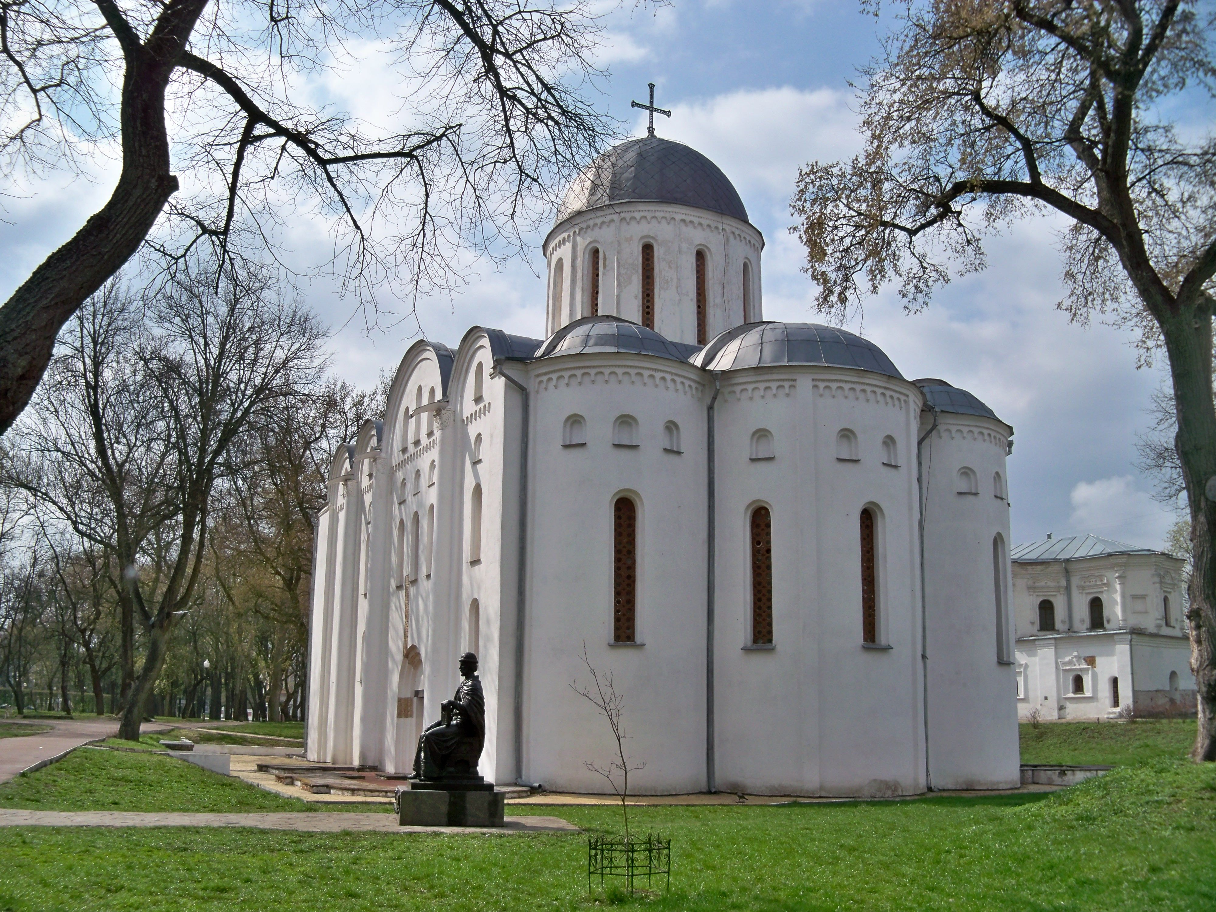 Борисоглібський собор (мур.), Чернігів, Вал